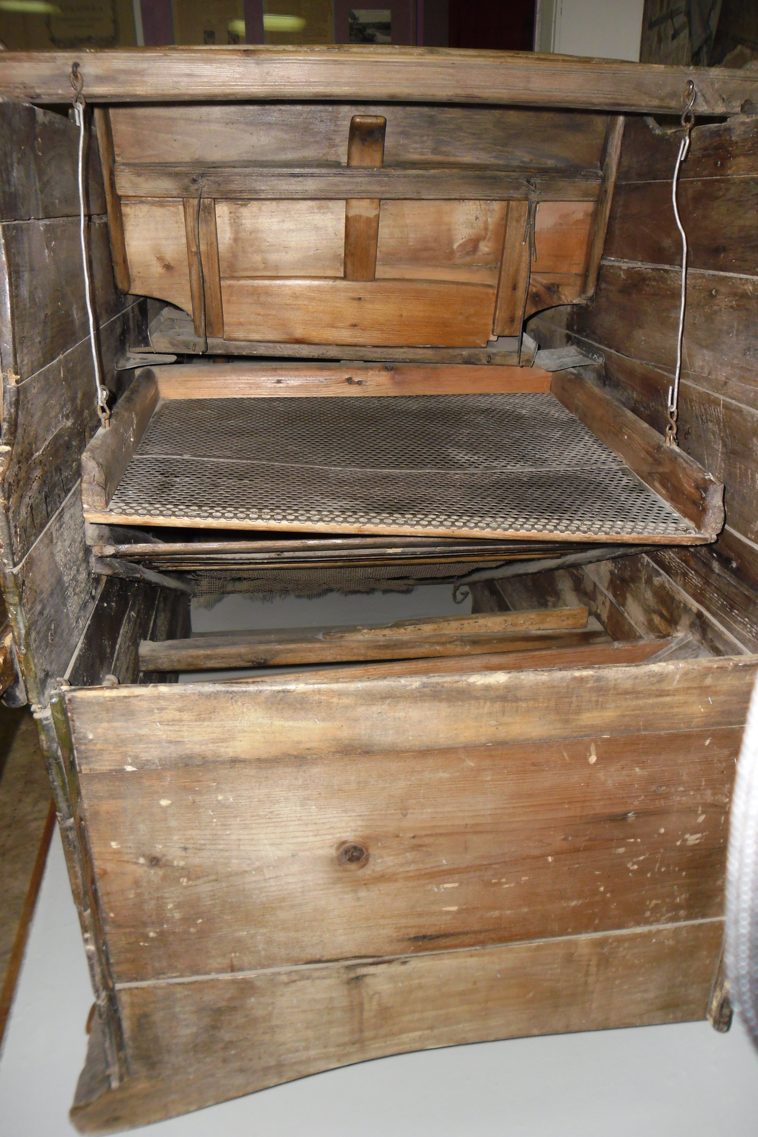 Фото